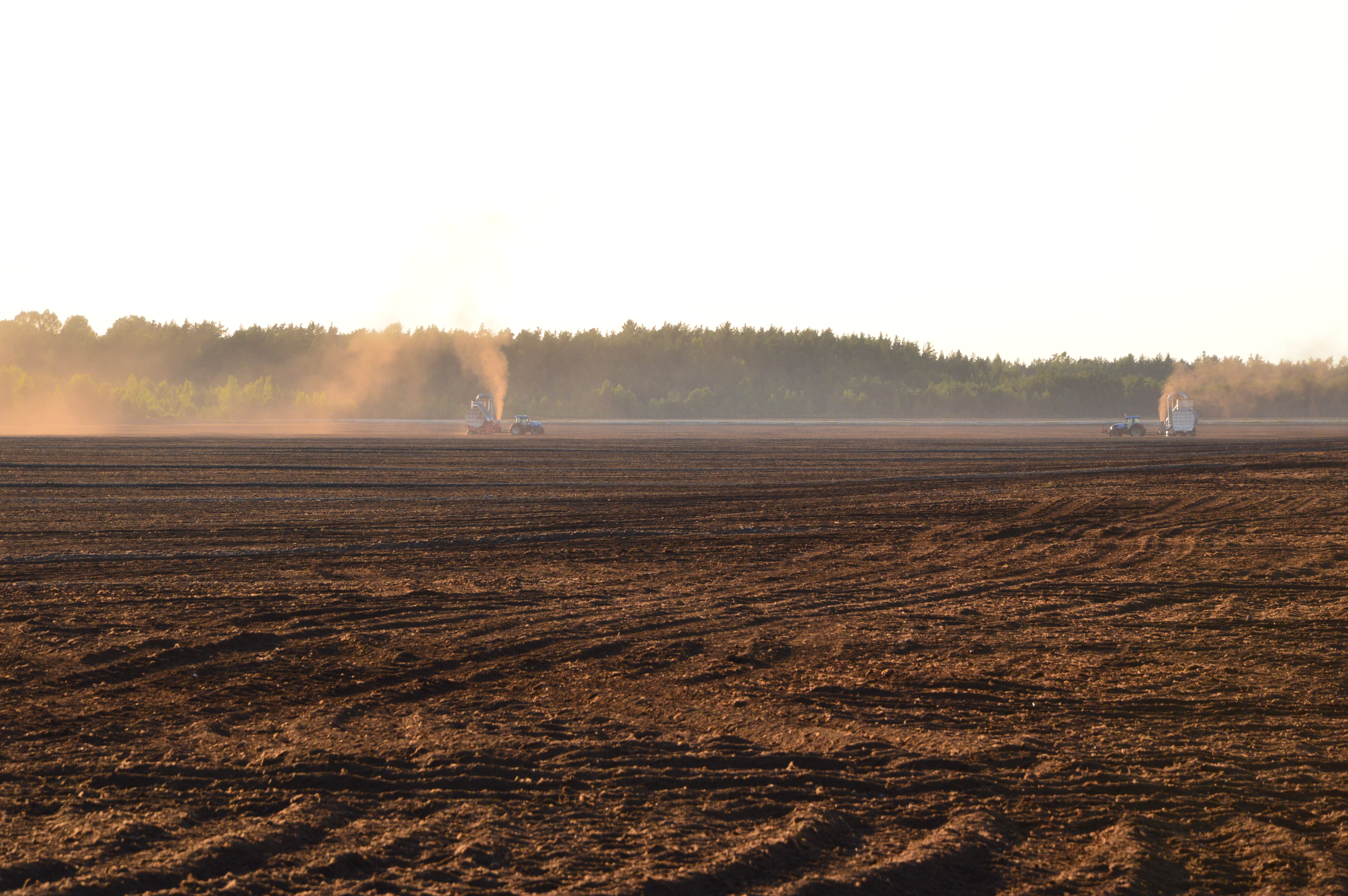 Turba kogumine Tõnumaa rabas.